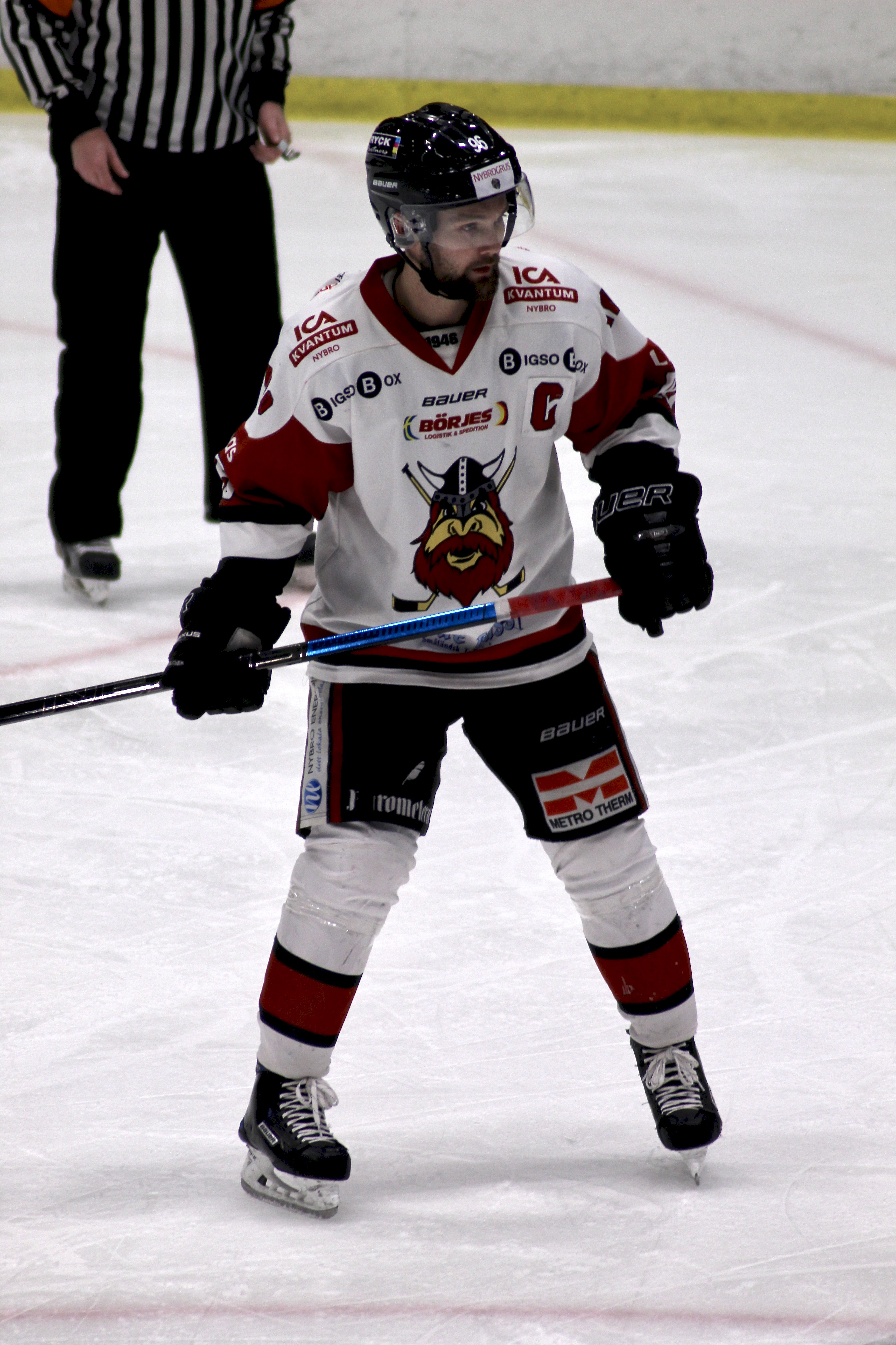 Marcus Mellström i Nybro Vikings bortaställ under match mot Halmstad Hammers 12 oktober 2018